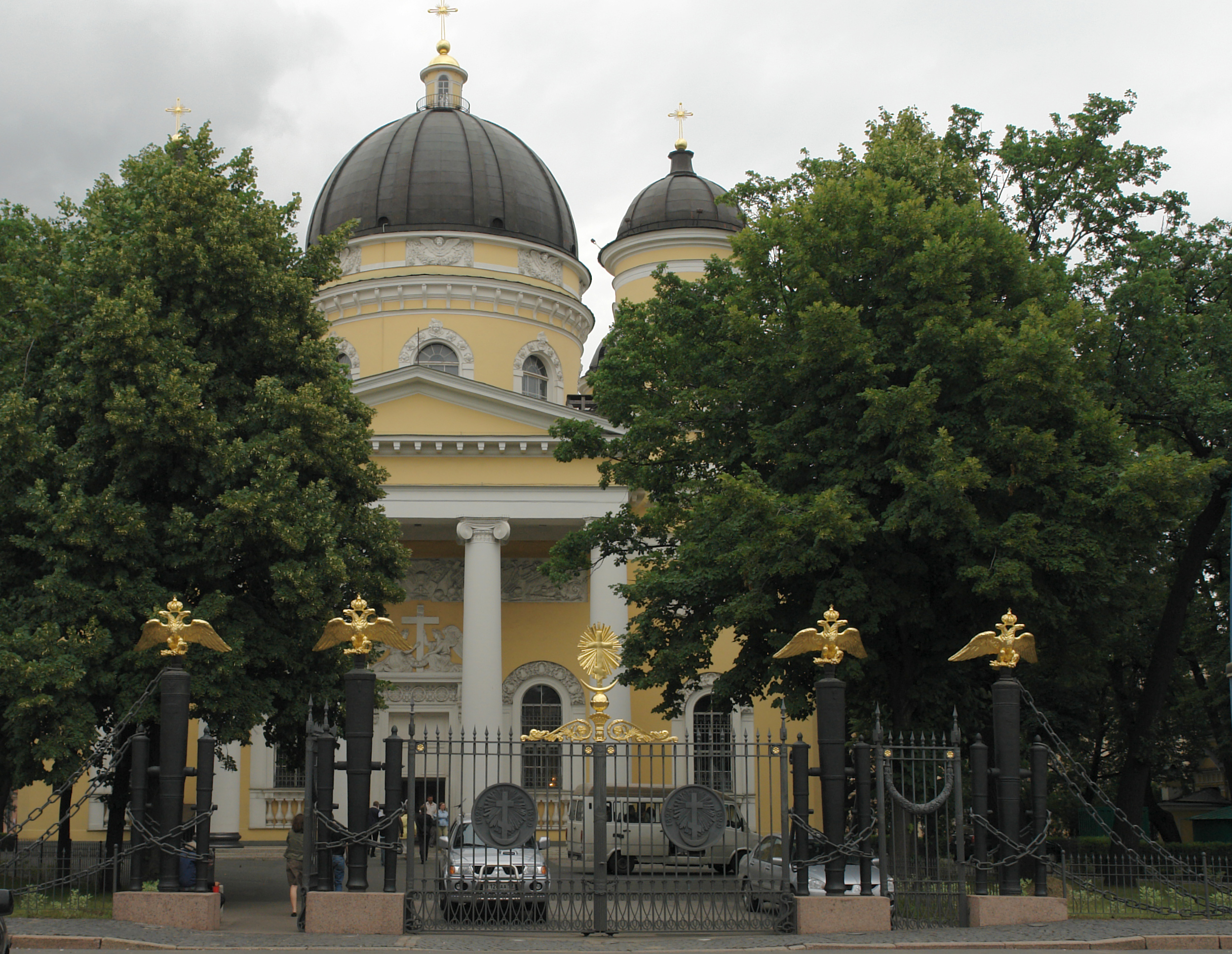 Центральный вход Спасо-Преображенского собора. Санкт-Петербург